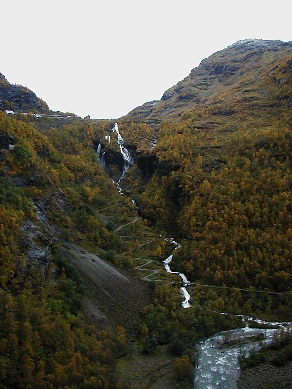 Myrdalsberget med Myrdalsfossen, Flåmselvi, Vatnahalsen høyfjellshotel og rallarvegen. Biletet er teke frå Flåmsbana.